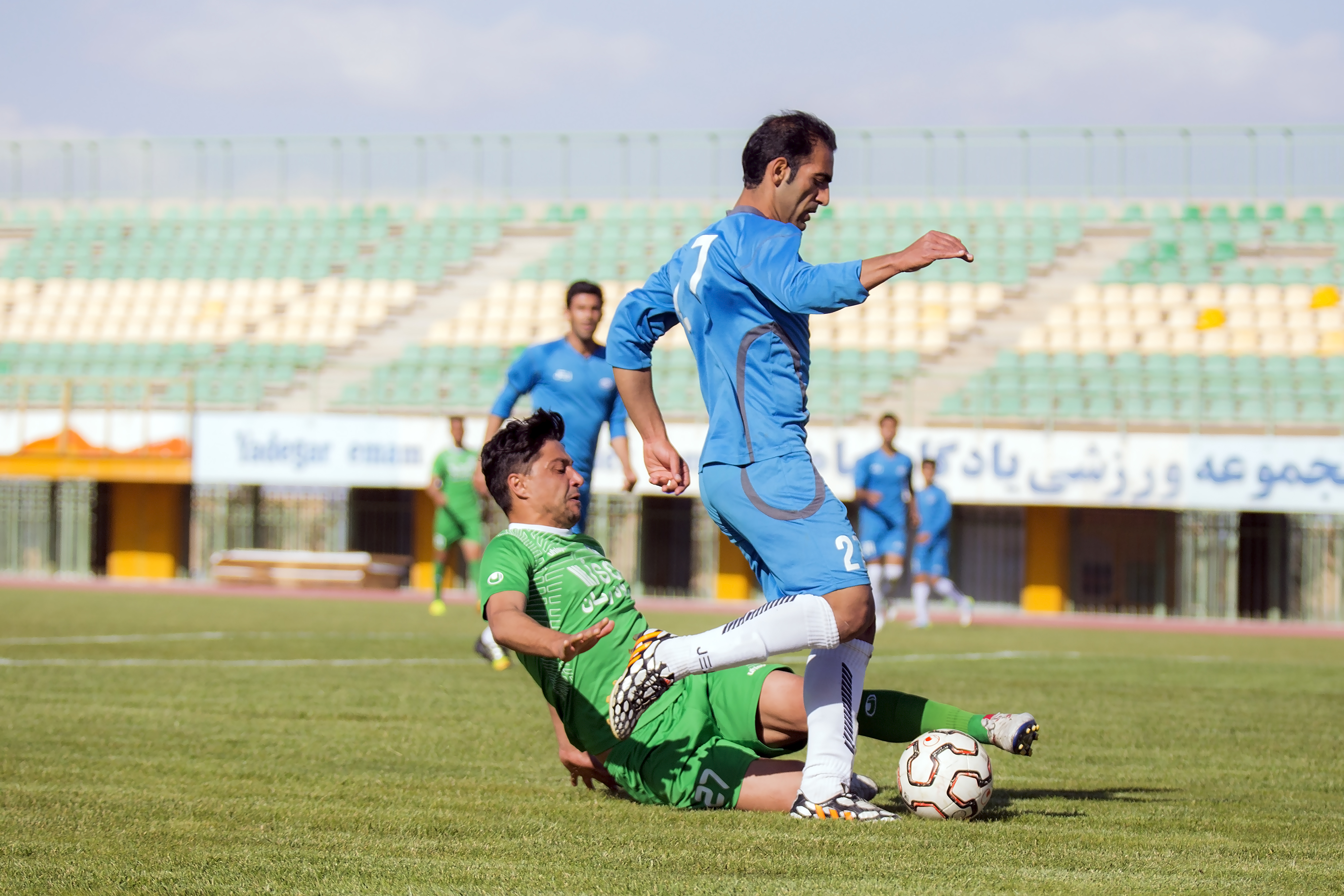 Žemaitėška: Fotbuols (angl. foot - pieda + ball - kamulīs) - žaidėms kamole terp dvėjū komandu. Kartās skėront nuog Amerėkuoneška fotbuola vadėnams asociacėju fotbuolu, palē Anglėjės Fotbuolo Asiociacėja, 1863 metās sosėkūrose dabartėniu taisīkliu fotbuolo pagrindus. Yorùbá: Bọ́ọ̀lù-ẹlẹ́sẹ̀ ייִדיש: פוטבאָל (אויך גערופן אסאסיאַציע פוטבאָל), [אדער מיטן צונאמען די וועלט שפּיל אָדער די שיינע שפּיל] איז אַ ספארט געשפילט צווישן צוויי מאנשאפטן פון עלף שפילער מיט אַ קייליכדיקן באַל. Winaray : An futbol o futból nga tinatawag gihapon nga soccer (kaluwas ha Winaray nga fonetika: SA-ker) usa nga Paugnat-ha-Kusog nga ginmumulayan han duha ka kampo nga mayda napulo kag-usa (11) nga magmurulay kada kampo. Walon: Li fotbale ou fotbal ou fousbal , c' est on spôrt ki onze djins pitèt eshonne dins ene bale, siconte ene ôte ekipe di onze, avou des tchmijhes d' ene ôte coleur. Vahcuengh: Cukgiuz dwg cungj cizdij yindung, youz doiq soeng ndeu doxdax, doiq ndeu miz 11 boux, sawjyungh aen giuz. Gyoengqvunz nyinhnaeuz de dwg aen yindung ceiq saeb vanhyingz.